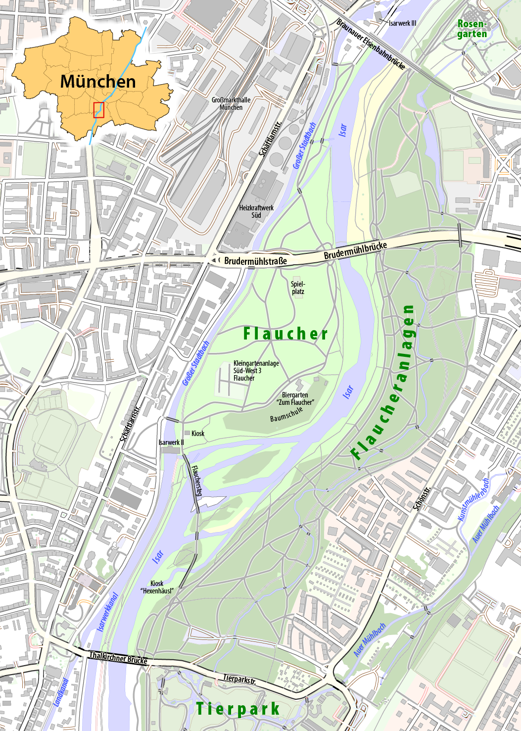 Karte des Flauchers in München